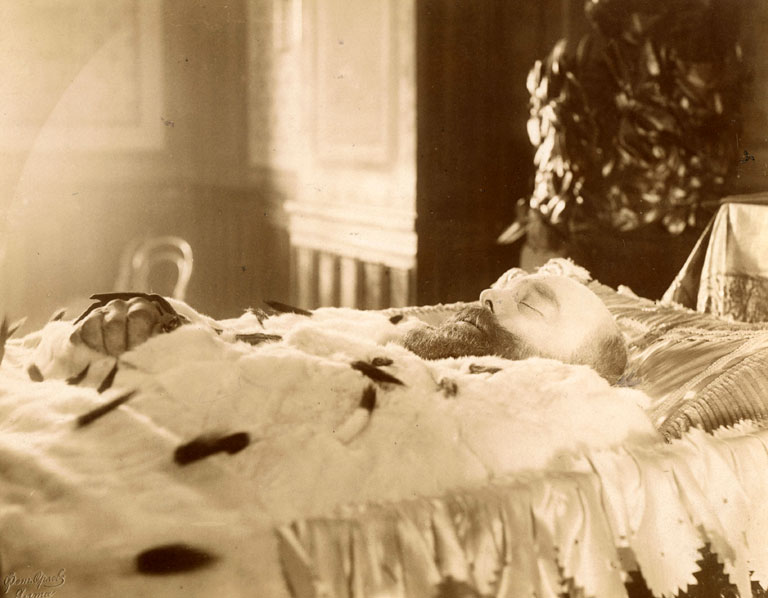 Император Александр III в гробу.